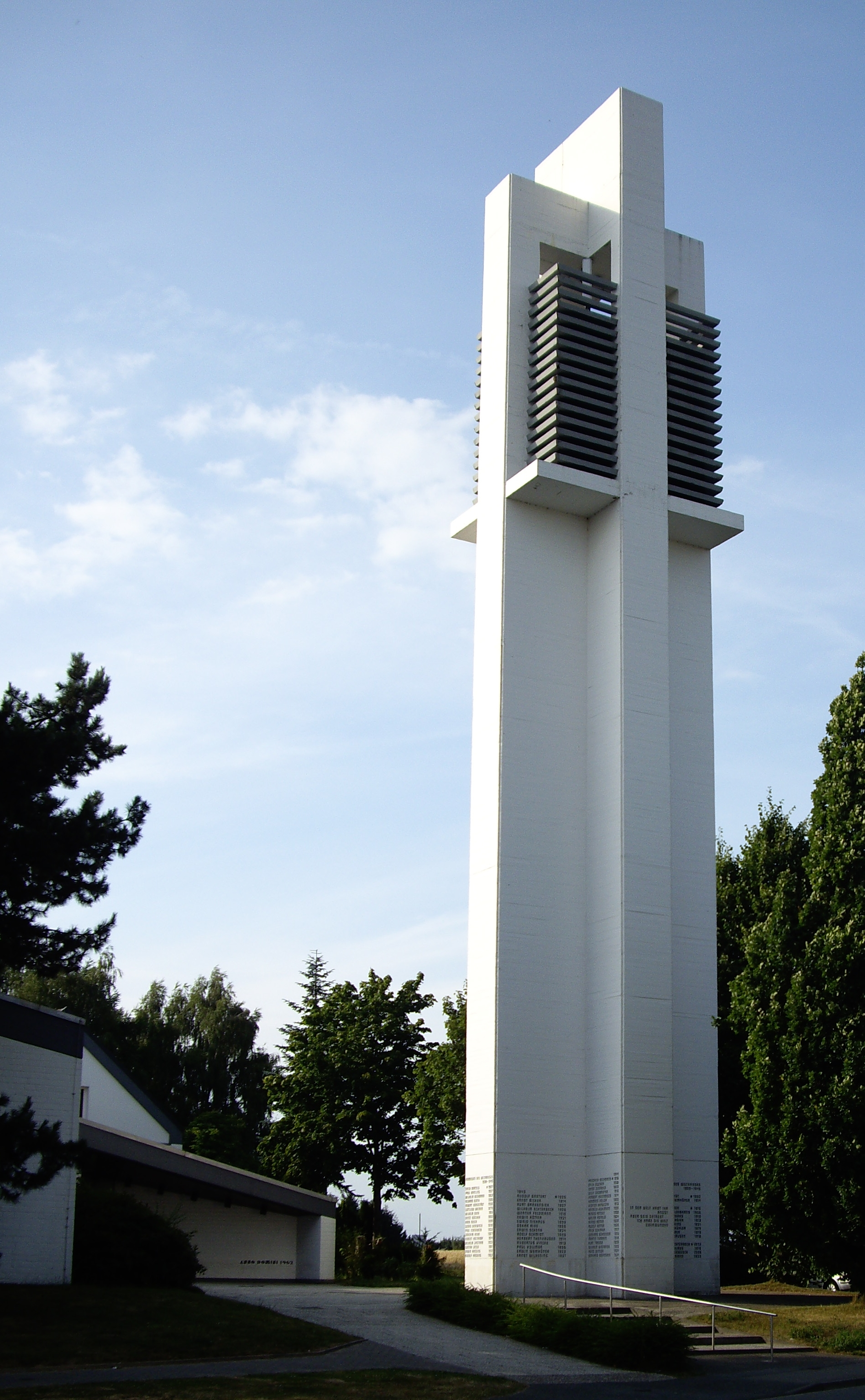 Turm der Evangelischen Kirche in Bielefeld-Vilsendorf.